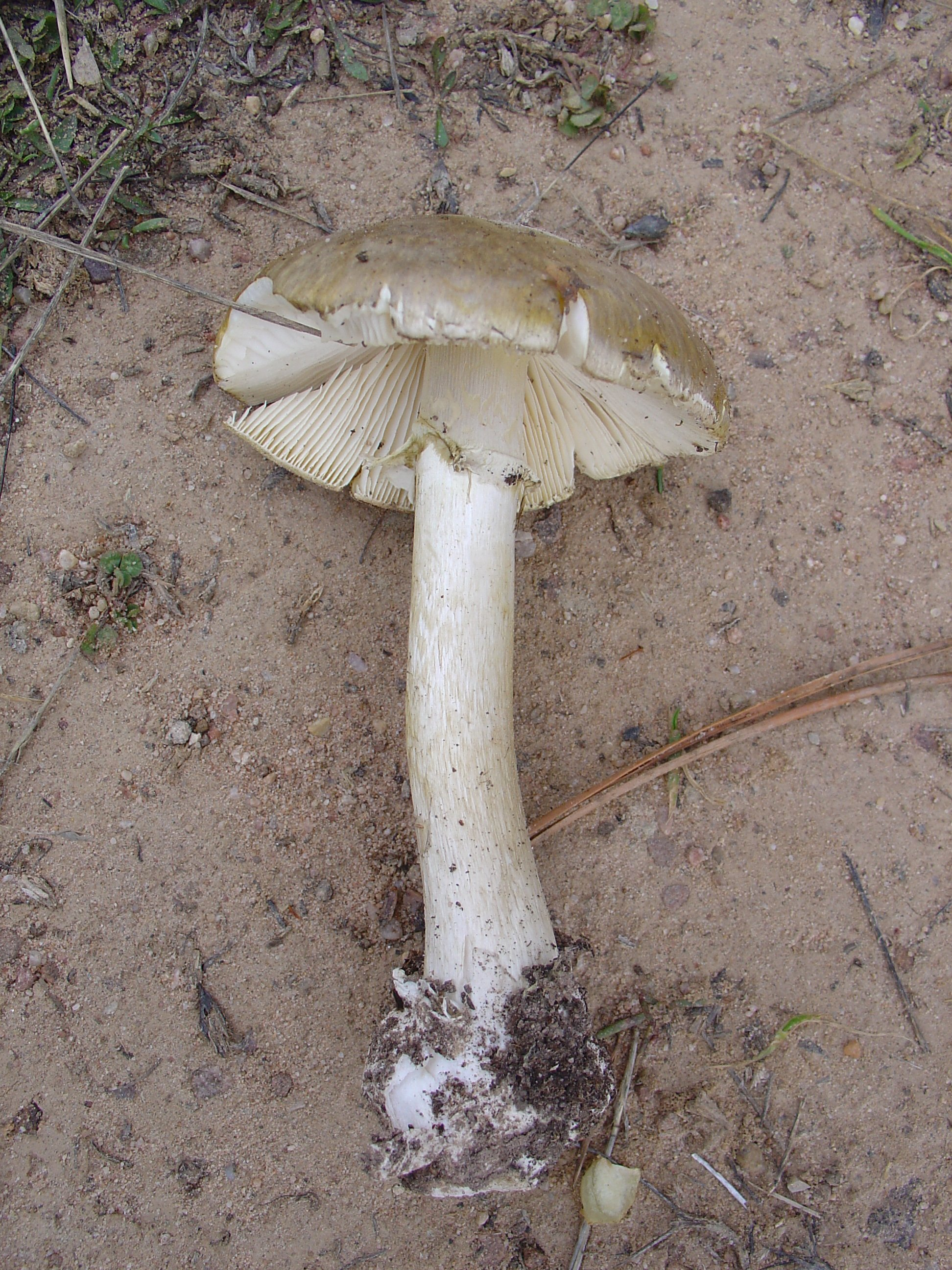 Amanita phalloides de la Sierra de Valdemeca, Cuenca, España